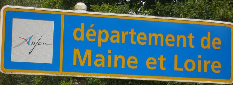 Panneau routier départemental